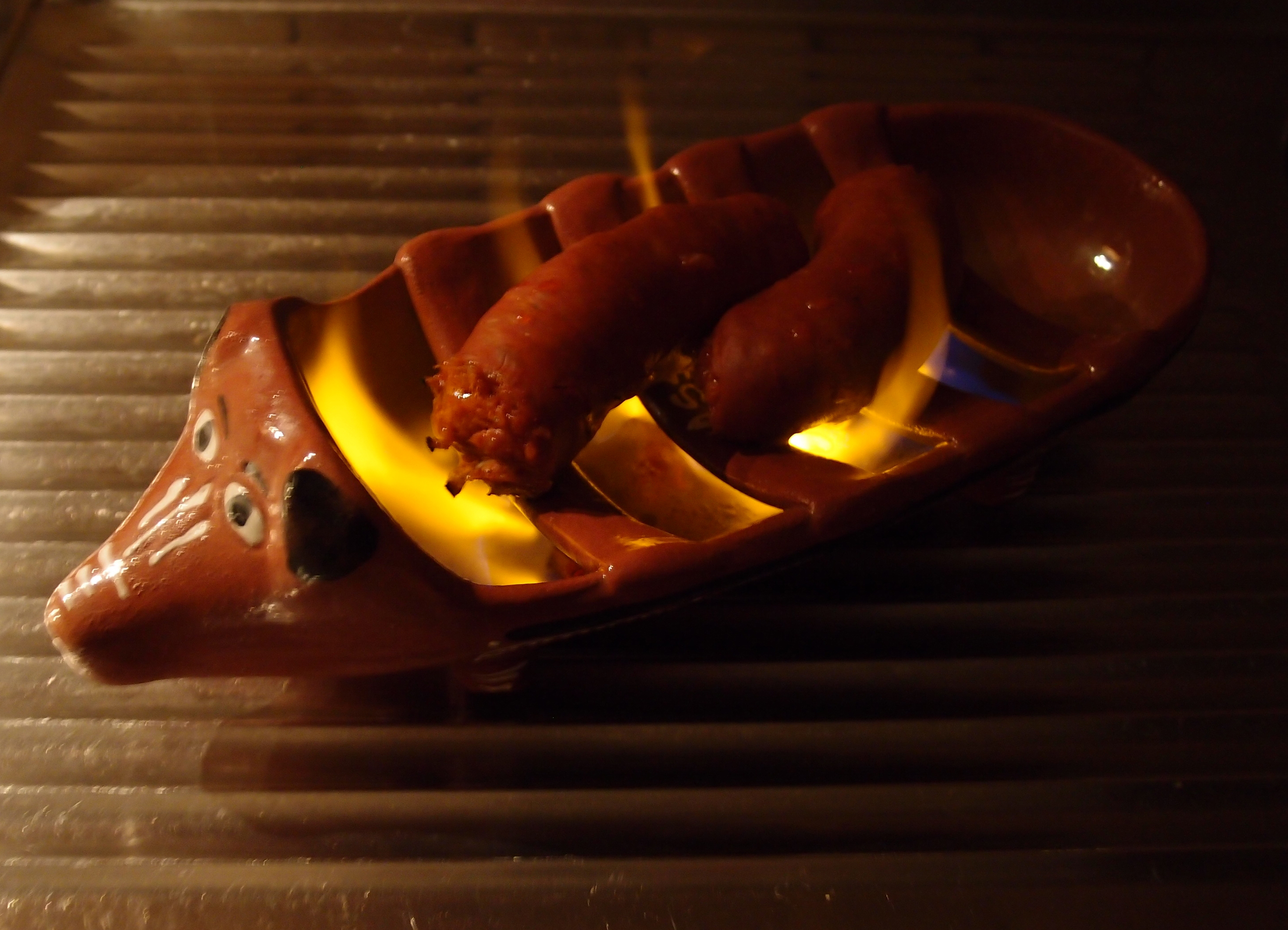 "Assa Chouriço" (Chorizo-Bräter / -grill) Datum: 23.03.2013 Urheber: M. Pfeiffer alias Gordito1869 Quelle: privates Fotoarchiv des Urhebers